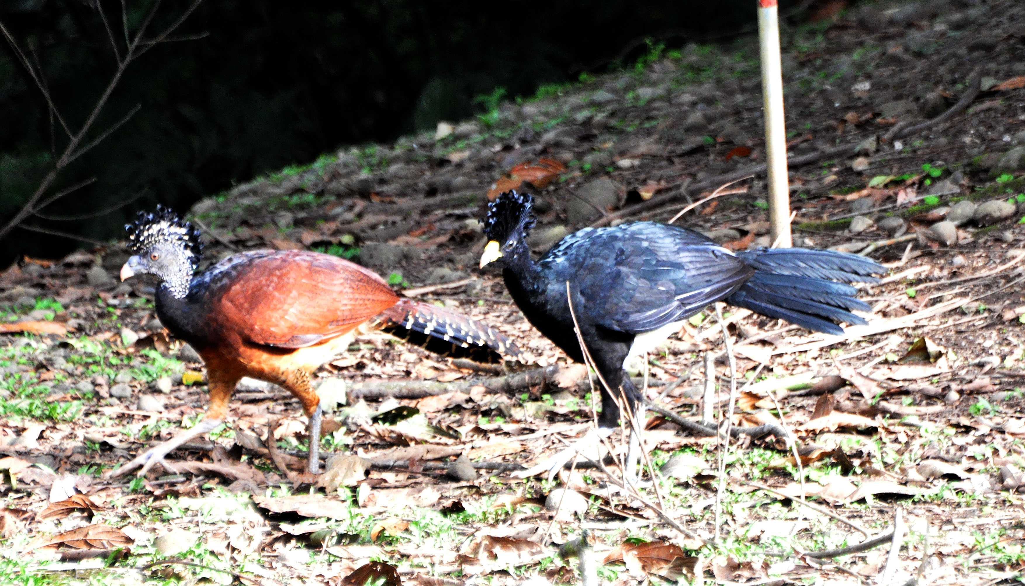 Crax rubra rubra 19-Mar-12 Le Selva, Costa Rica